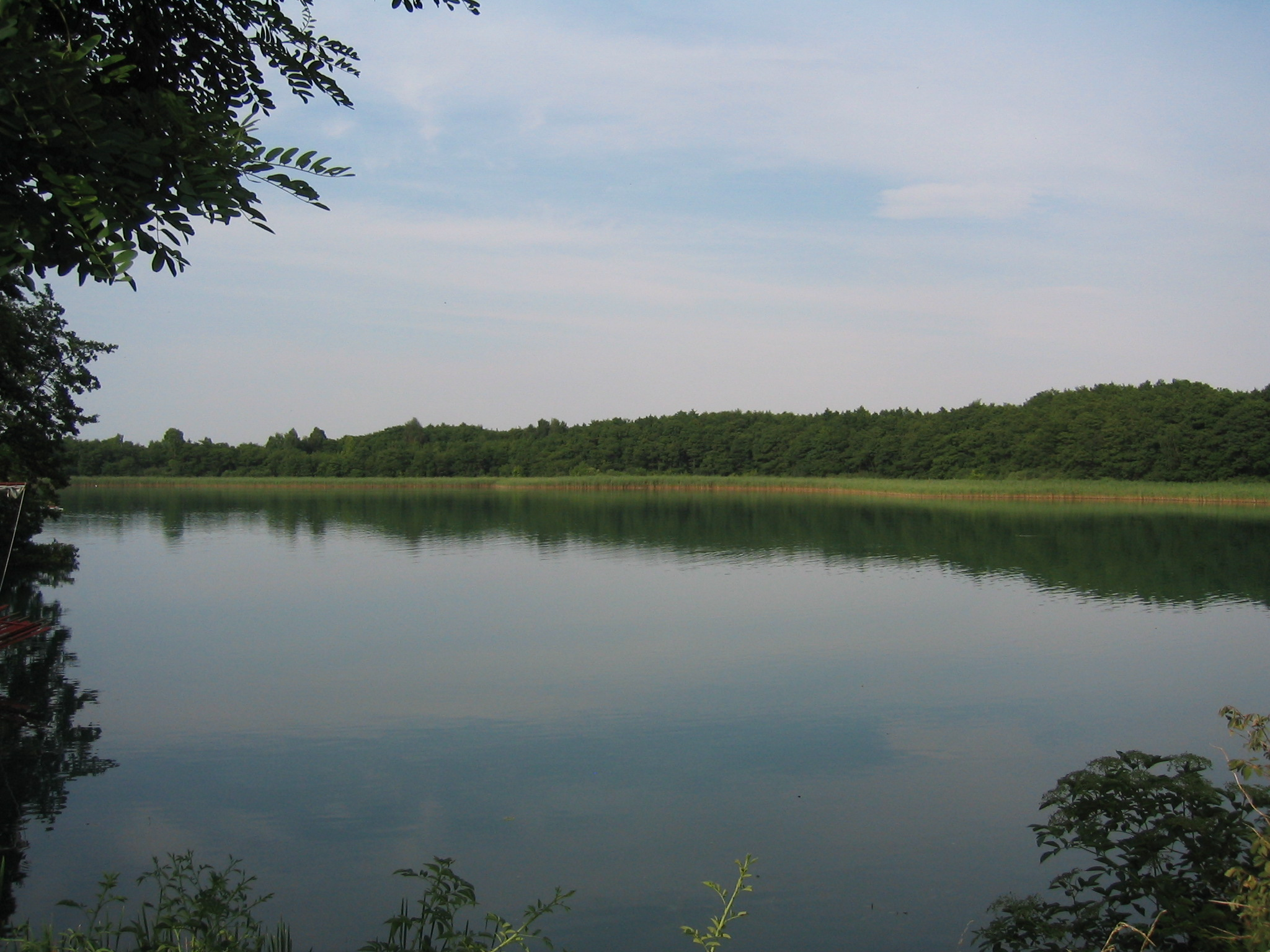 Der Breite Luzin in Feldberg.